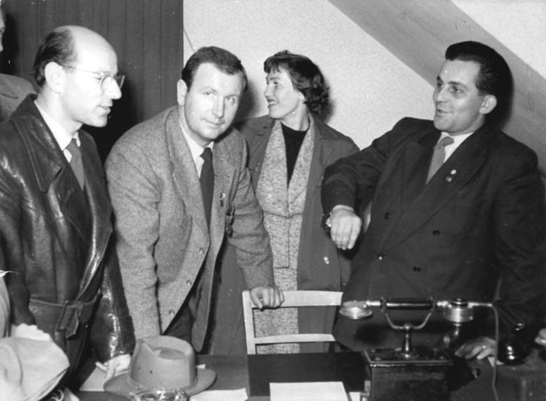 Heusdorf, Besuch von Künstlern Zentralbilld Bez. Red. Erfurt-20.10.1955 Wehse-3236 Me-We 2 Motive Künstlerkollektiv des Thälmann-Films auf der MTS Apolda-Heusdorf. Zu einem großen Erlebnis für die Landbevölkerung des Kreises Apolda, Bezirk Erfurt, wurde die Aufführung des Films Ernst Thälmann - Führer seiner Klasse am 18.10.55 im Kulturhaus der MTS Apolda-Heusdorf. An der Vorstellung nahmen Künstler, die im Thälmann-Film mitwirkten, teil. UBz: Der Direktor der MTS Apolda-Heusdorf, Nationalpreisträger Wolfgang Hahn (rechts) im Gespräch mit den Nationalpreisträgern Dr. Kurt Maetzig (1.vl.l.) und Günter Simon (2.v.l.)